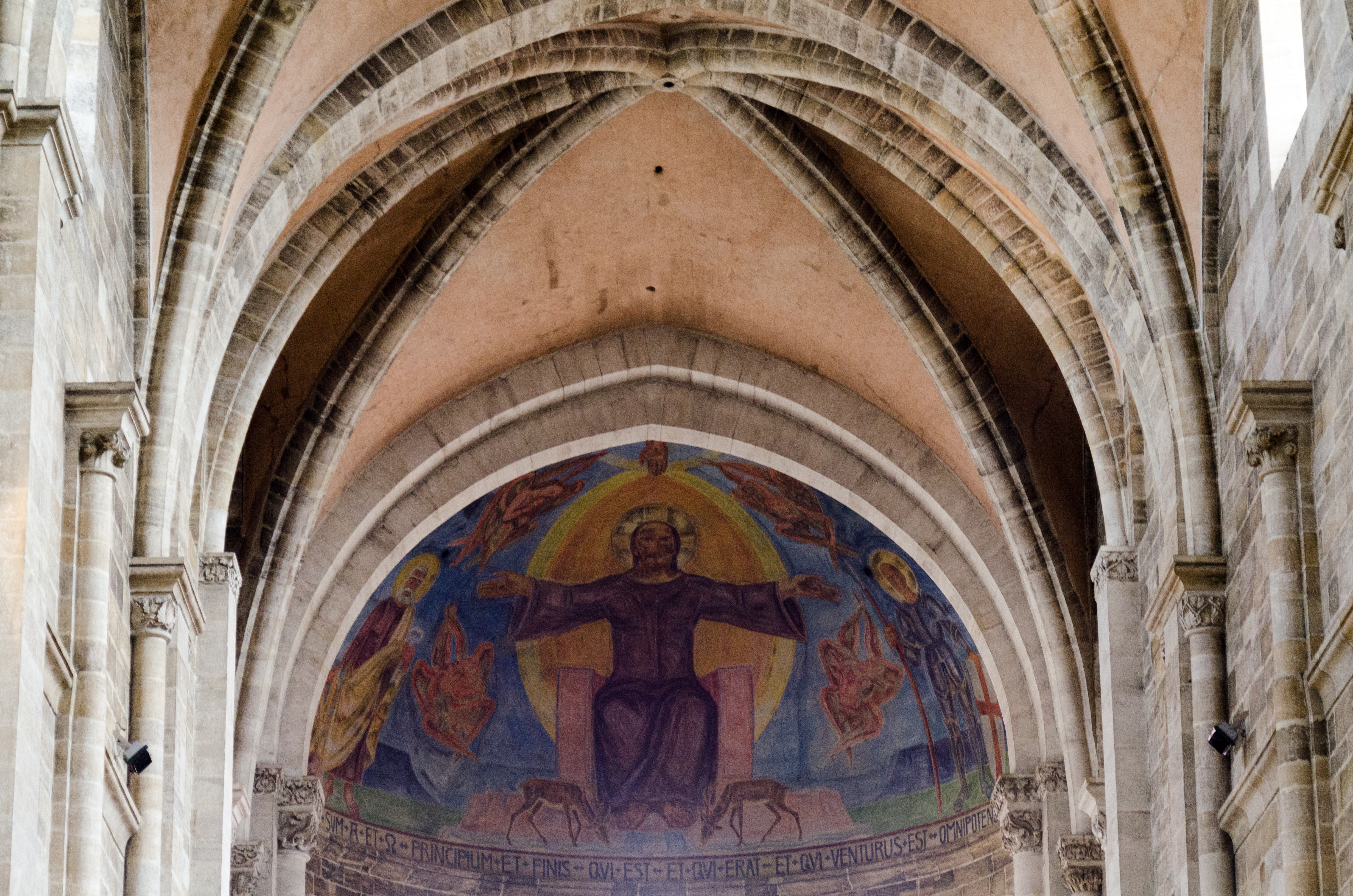 Bamberger Dom